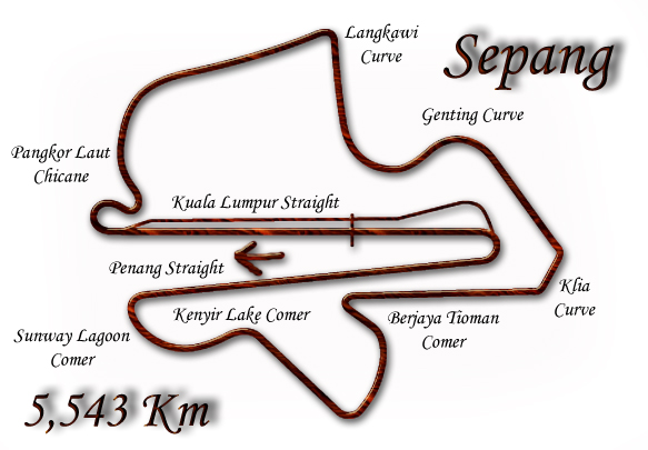 Grand Prix Malaisie /1999-2006/ Autor: Jiří Žemlička